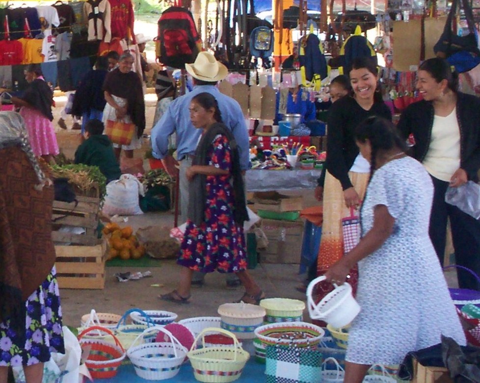 Tianguis en Eloxochitlán de Flores Magón (Oaxaca, marzo de 2007)